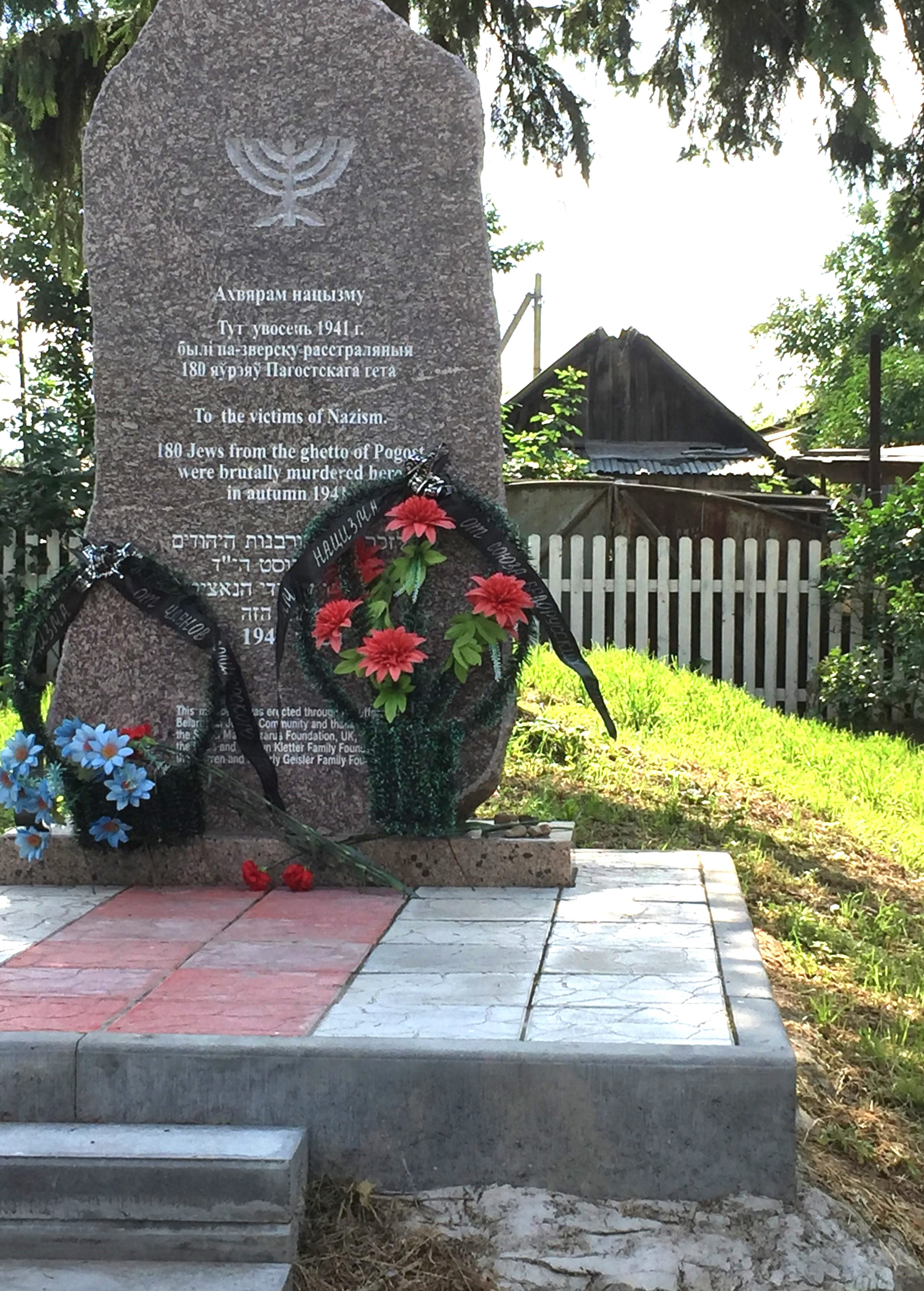 Один из двух новых памятников на братских могилах евреев деревни Погост Солигорского района Беларуси, убитых во время Холокоста. Число убитых на этом месте - 180 человек. Этот новый памятник возведен на месте старого в 2016 году